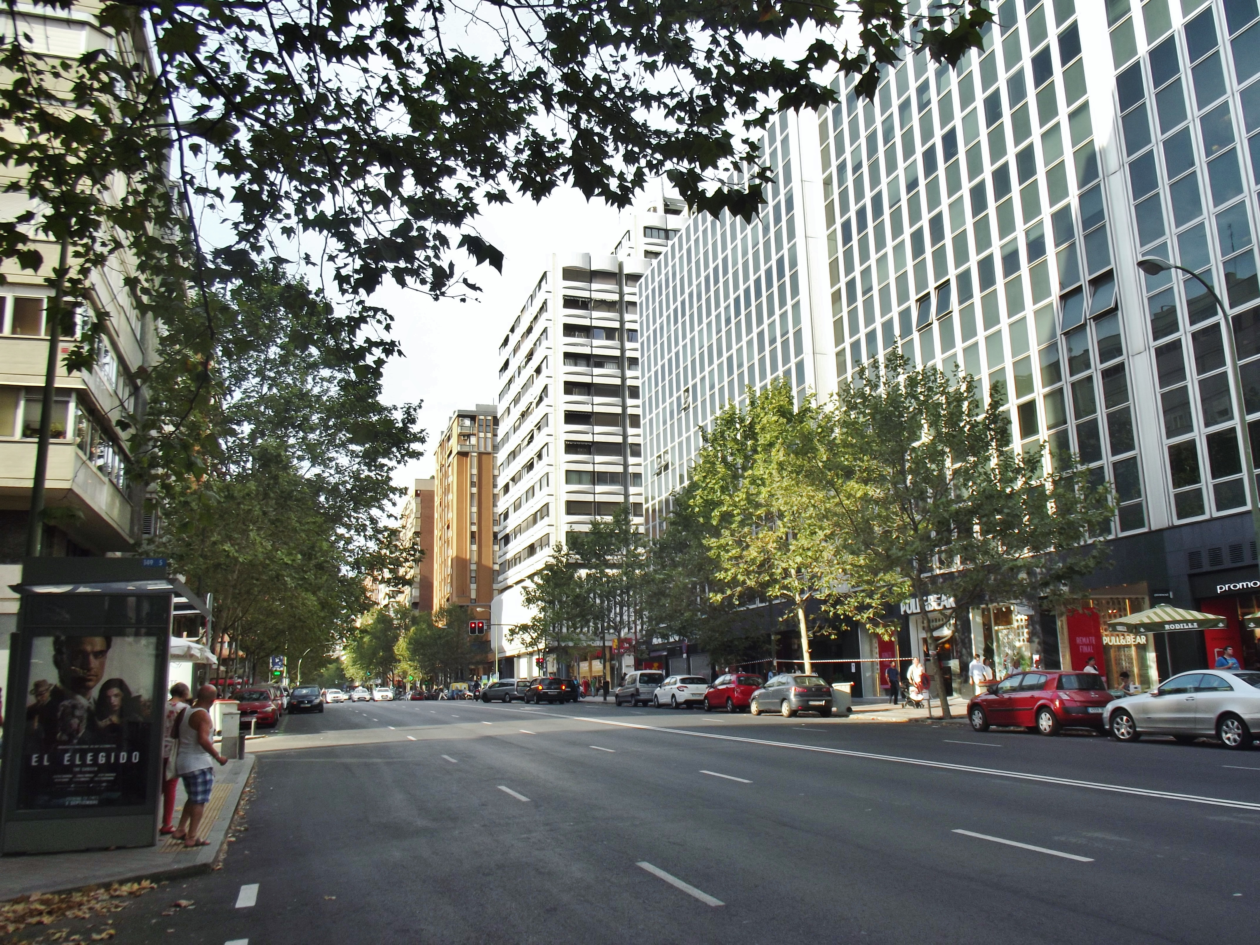 Calle de Orense, Madrid.